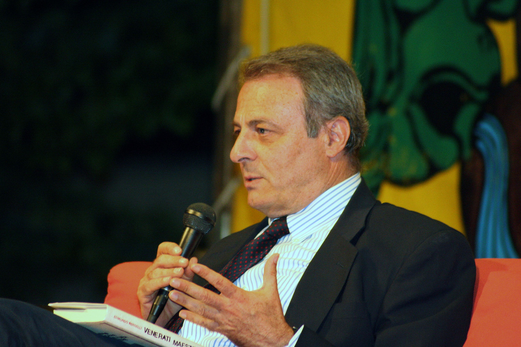 Edmondo Berselli alla presentazione del libro "Venerati Maestri" tenutasi a Castrocaro